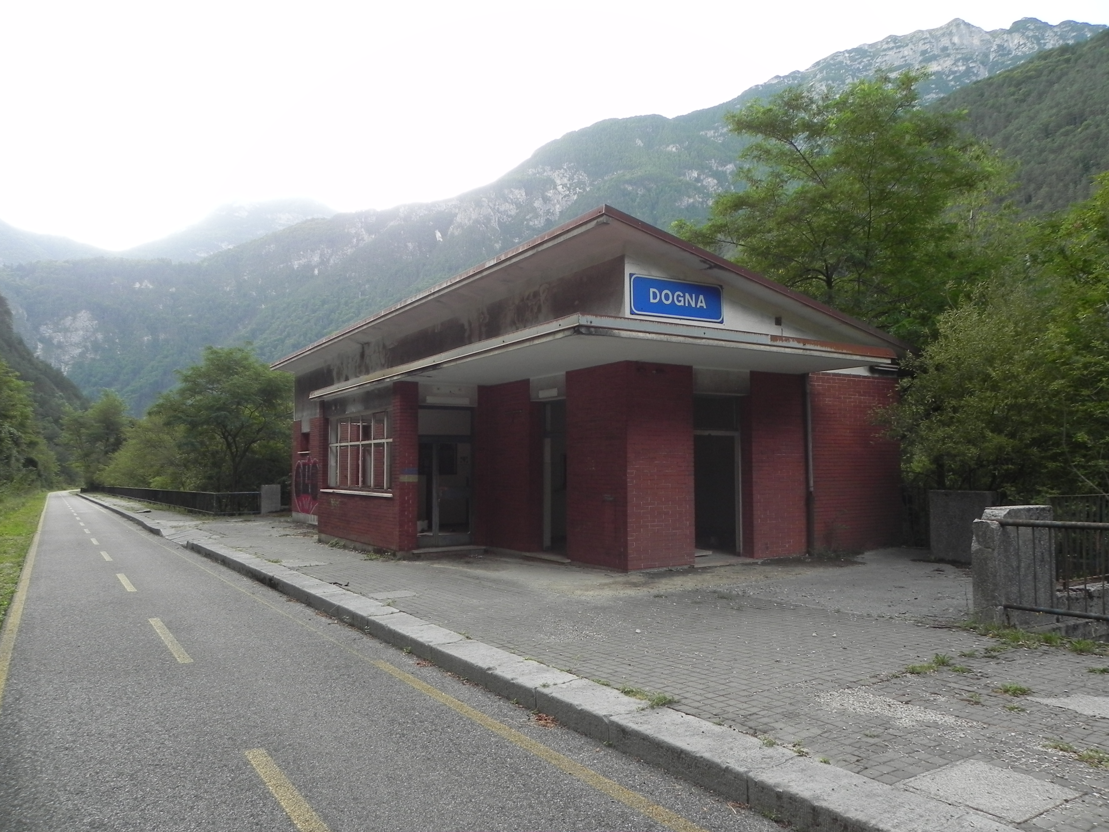 La vecchia stazione di Dogna sulla ferrovia Pontebbana.